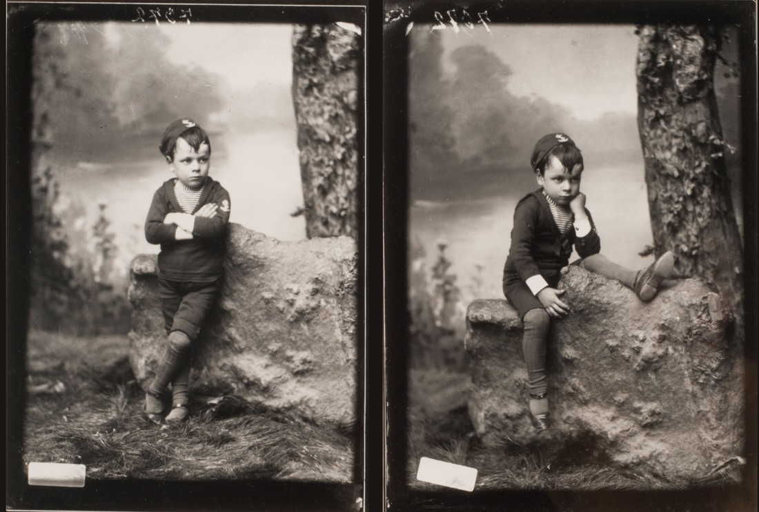 Alejandro Witcomb, Julián Martínez (niño en pose). 1887. 18 x 12,9 cm, con marco: 63 x 53 cm, fotografía blanco y negro sobre papel. Inv. 10964.